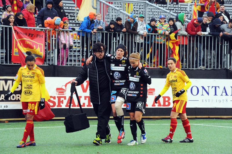 a_21_3660